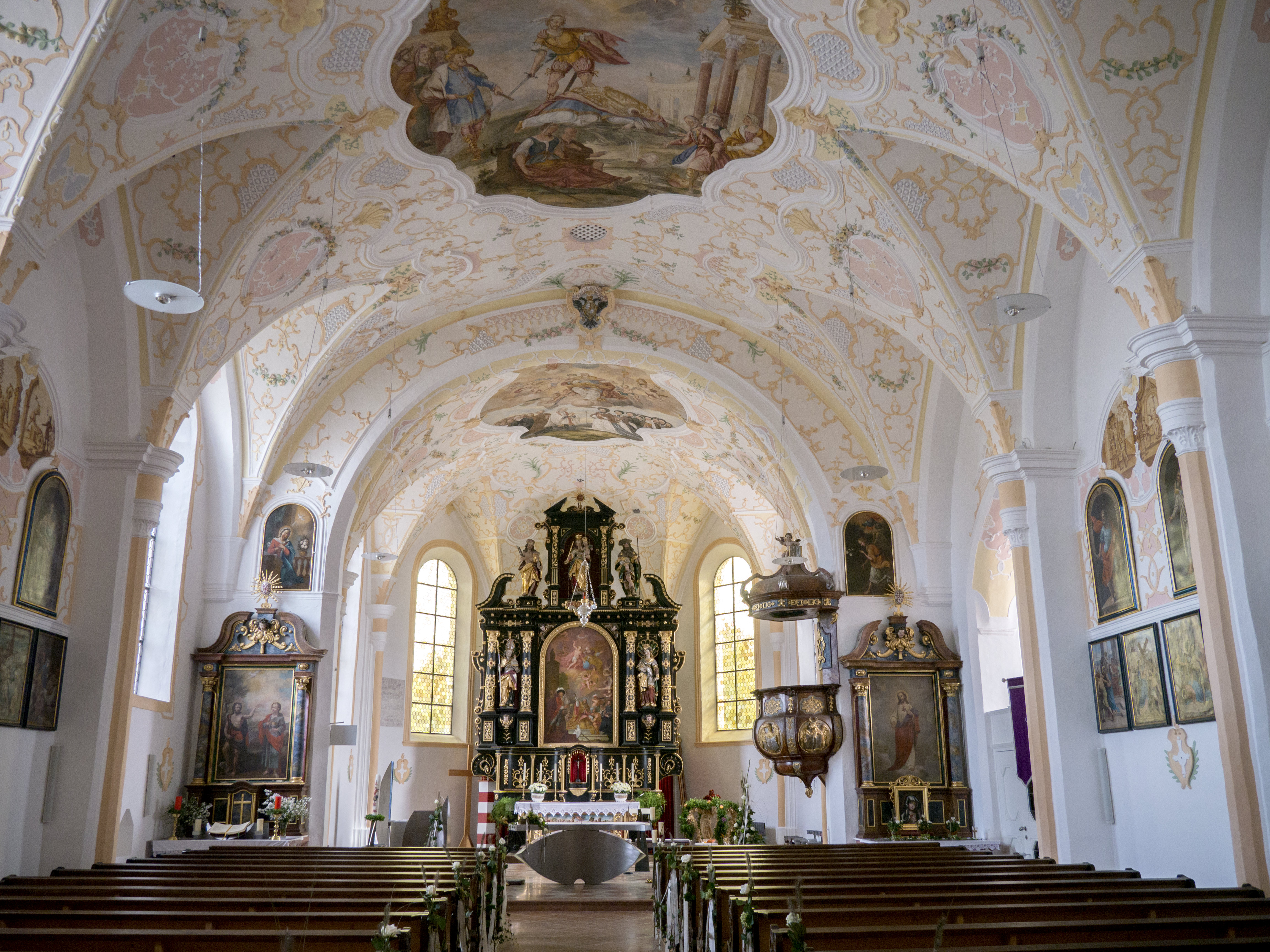 Kath. Pfarrkirche hl. Maximilian und Friedhof mit Ummauerung und Toranlage